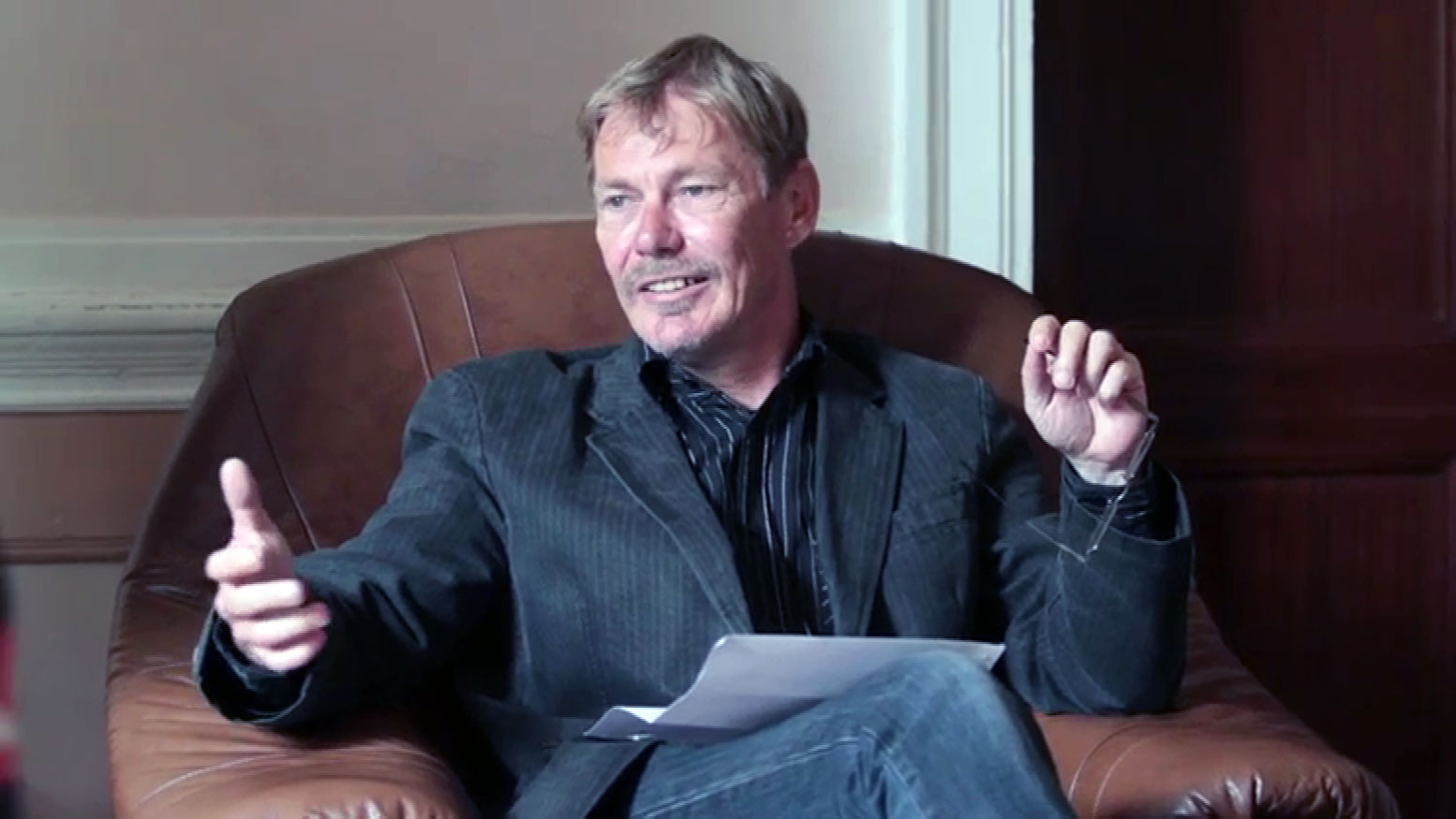 Der Schriftsteller Gerald Höfer in einem Interview